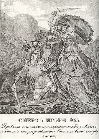 Смерть Игоря